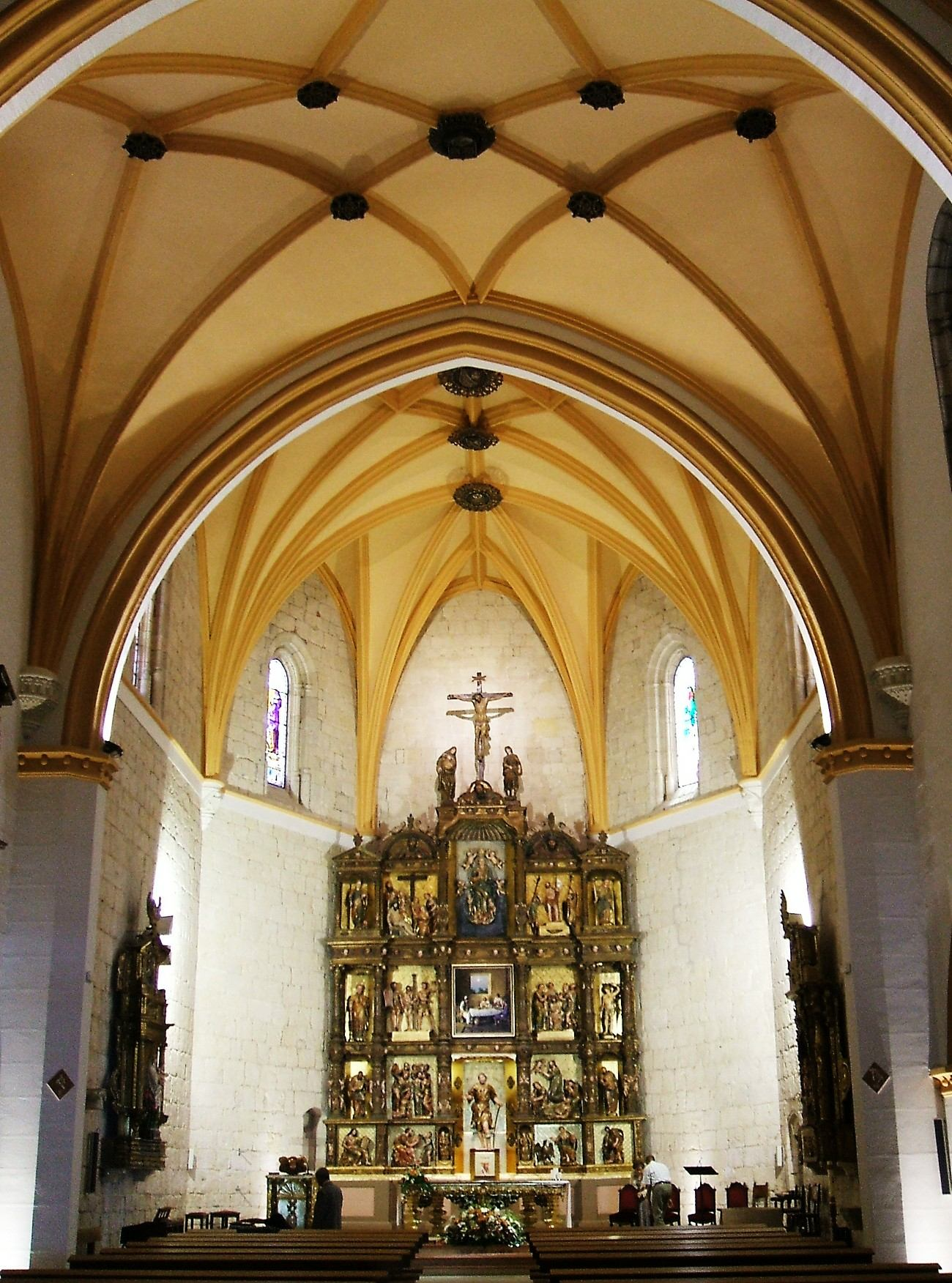 Cabecera de la Iglesia de San Lázaro, Palencia, España/Spain